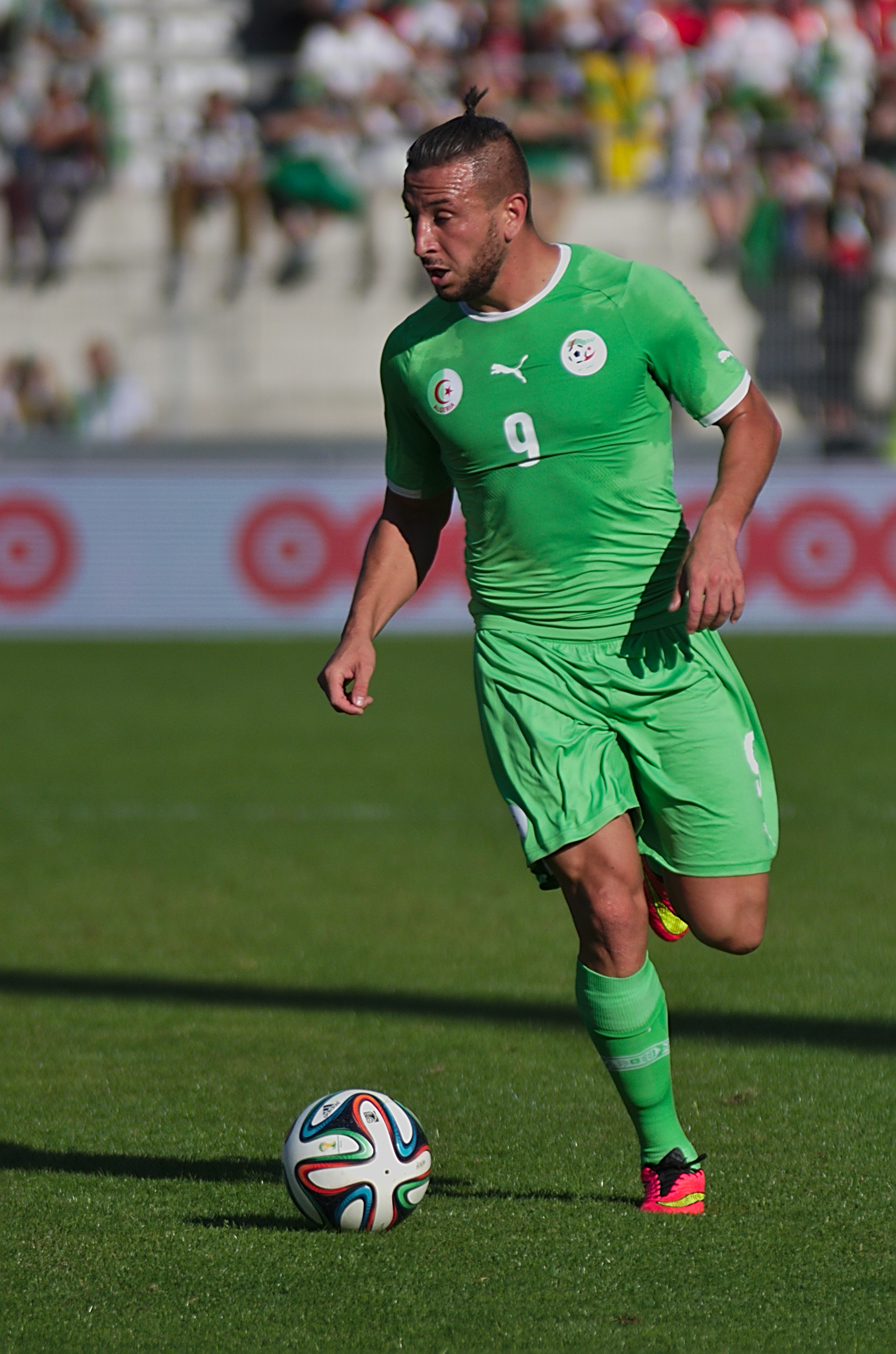 Algérie - Arménie - 20140531